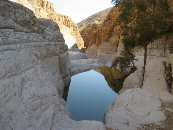 לאחר שיטפון קטן בתחילת פברואר מלאים גבי נחל דוד העליון במים צלולים.